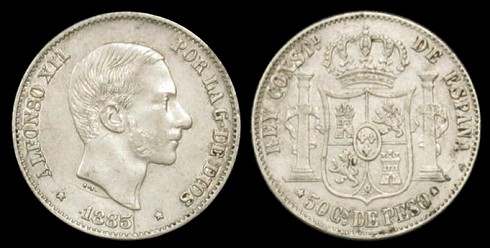 50 céntimos